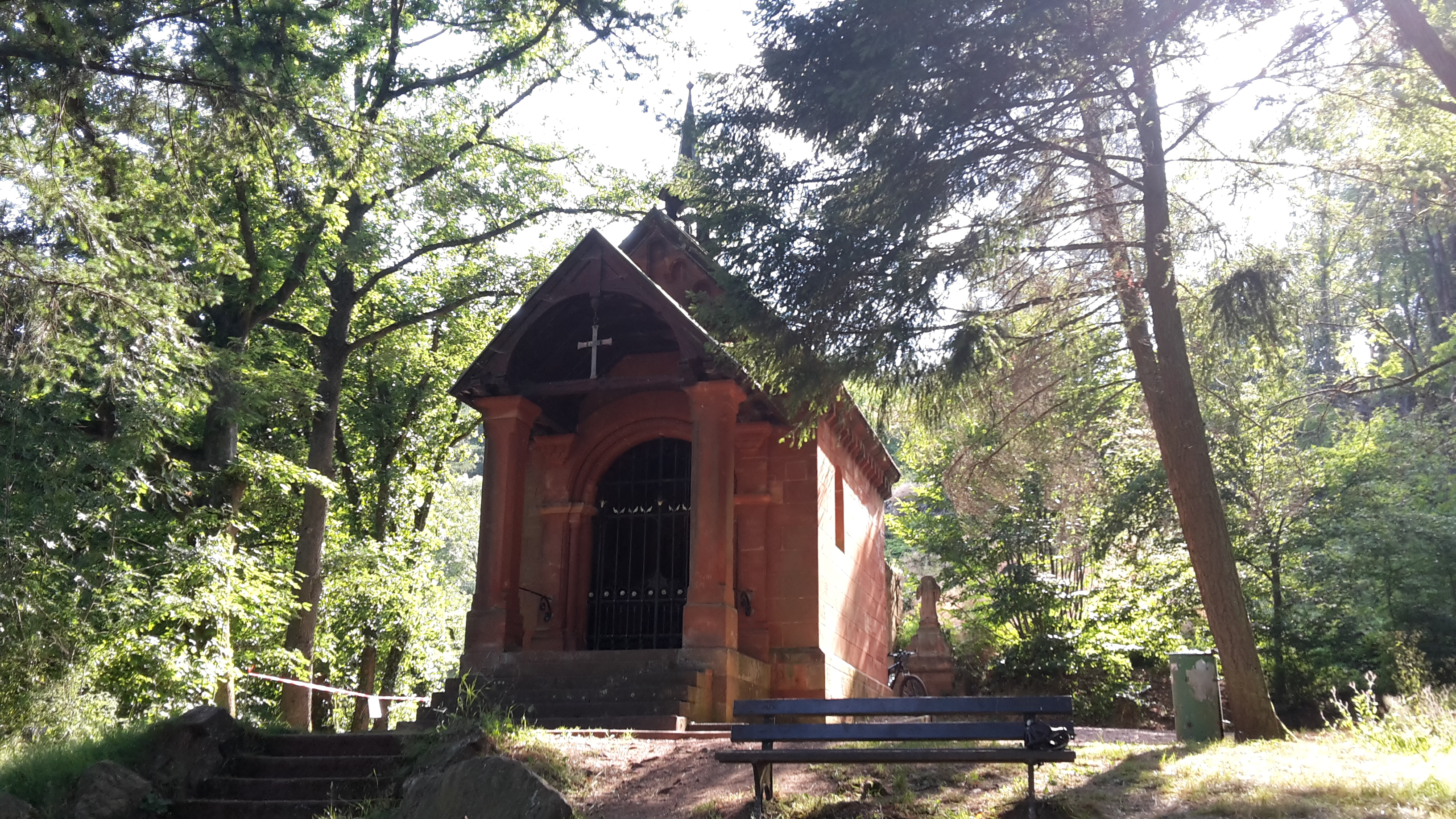 Aussenansicht